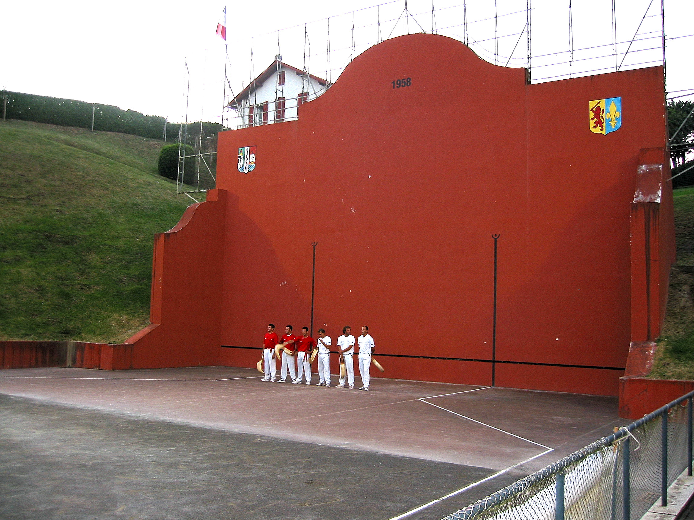 Bidart, le fronton. Photo prise le 12/07/05 par Harrieta171